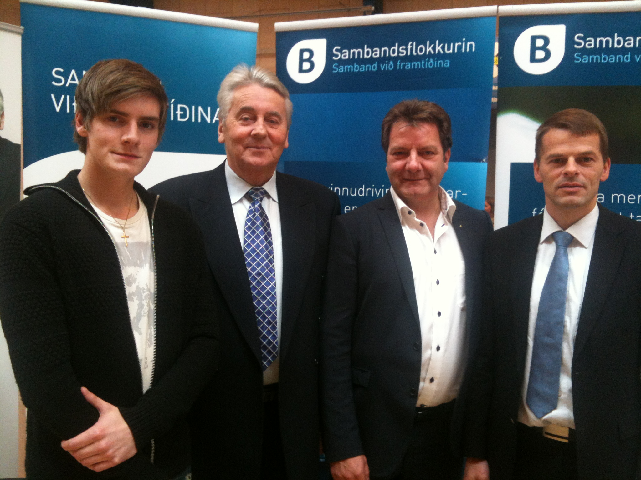 Politikere fra det færøske politiske parti Sambandsflokkurin. F.v.: Magnus Herdalur, form. for partiets ungdomsorganisation Unga Samband, Edmund Joensen, medlem af Folketinget, Johan Dahl, landsstyremand (industriminister), og Bárður Nielsen, form. for Lagtingets (det fær. parlament) finansudvalg